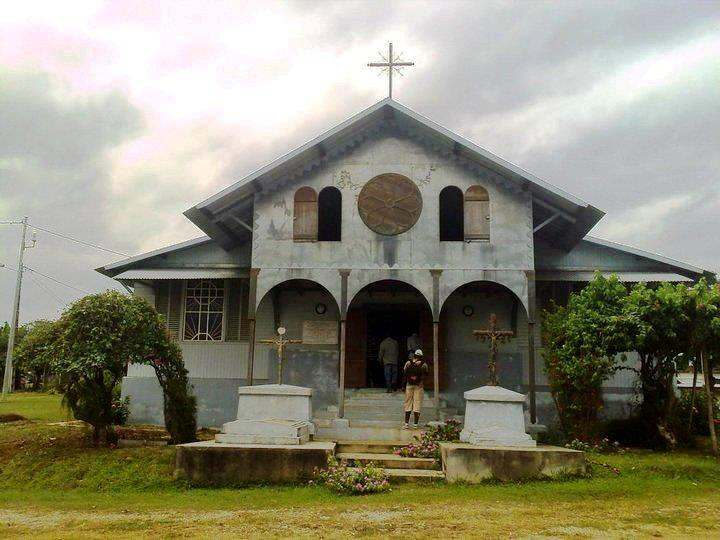 Une des plus ancienne mission catholique du Gabon.